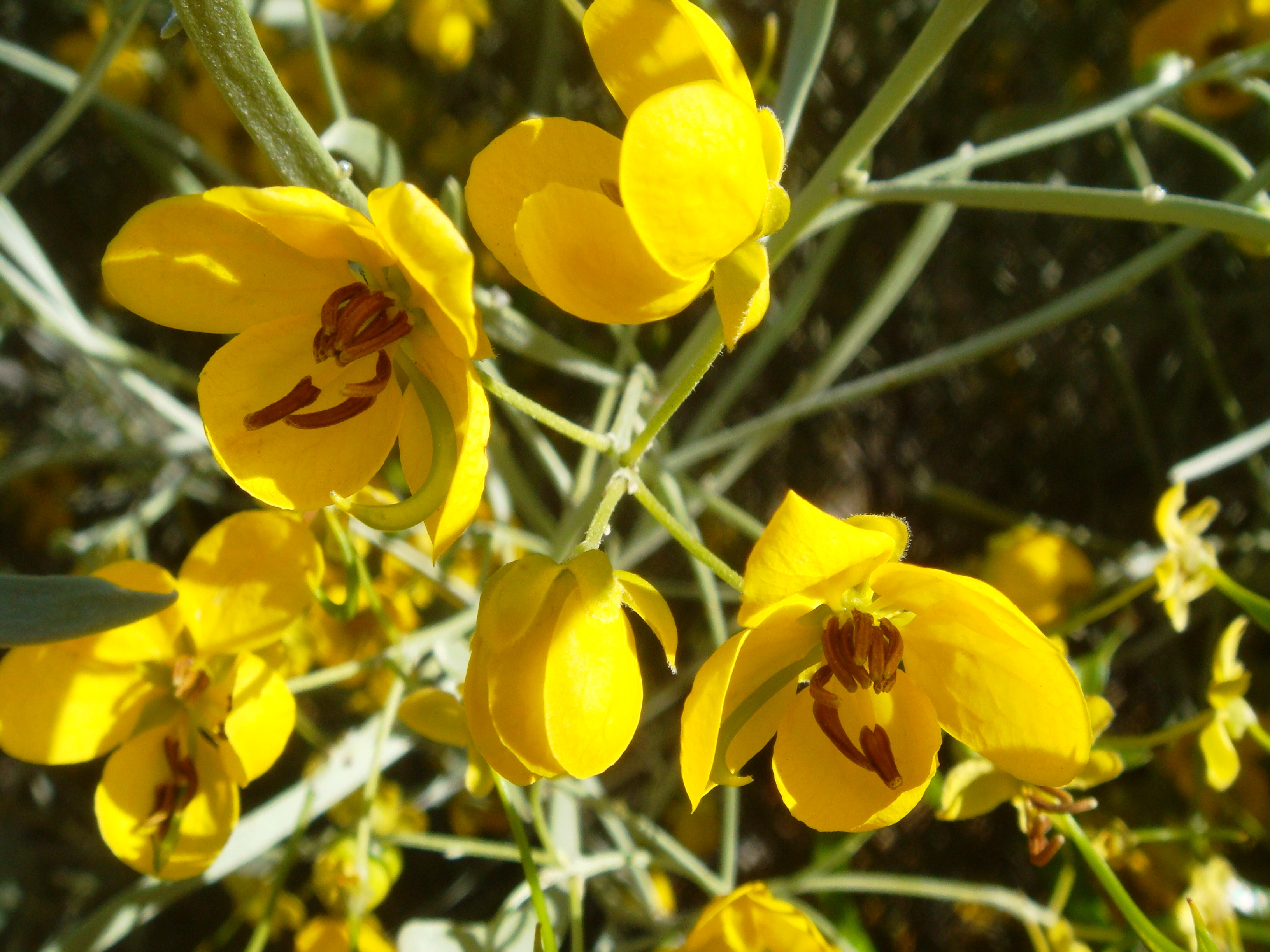 Senna artemisioides, cultivated, private residence, Tempe, Arizona